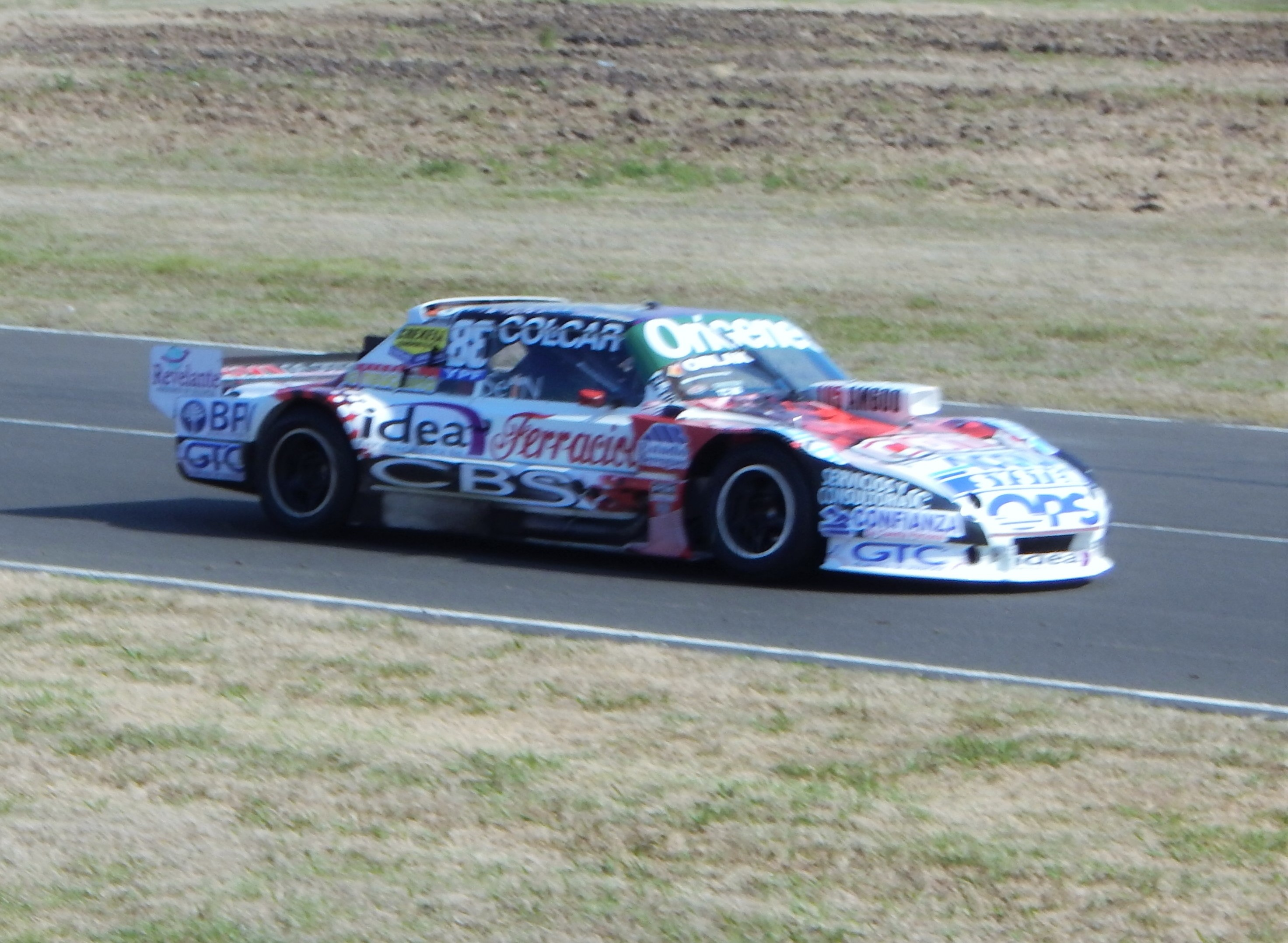 Camilo Echevarría TC Paraná 2015